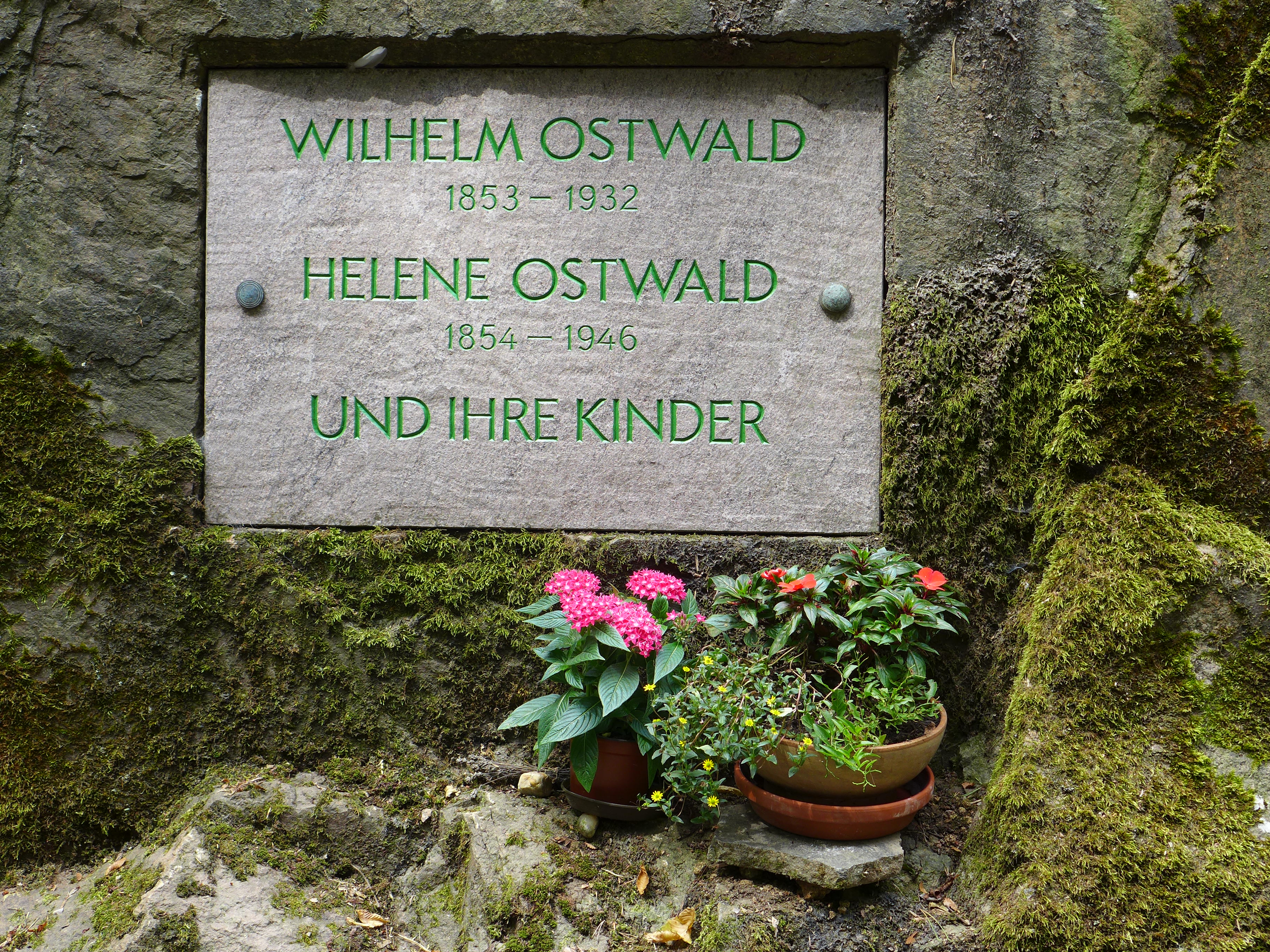 Wilhelm-Ostwald-Parko en Großbothen, Germanio. Epitafo sur roka tombo de familio Ostwald